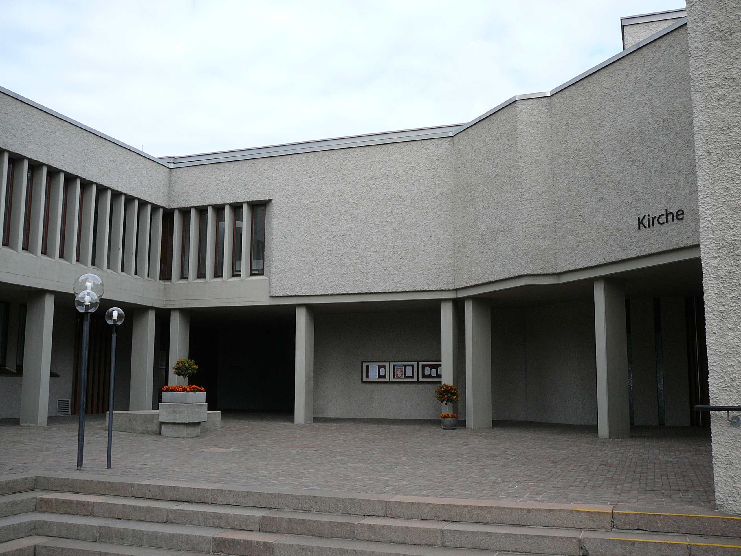 Römisch-katholische Kirche St. Katharina Zürich-Affoltern, Zugang zur Kirche